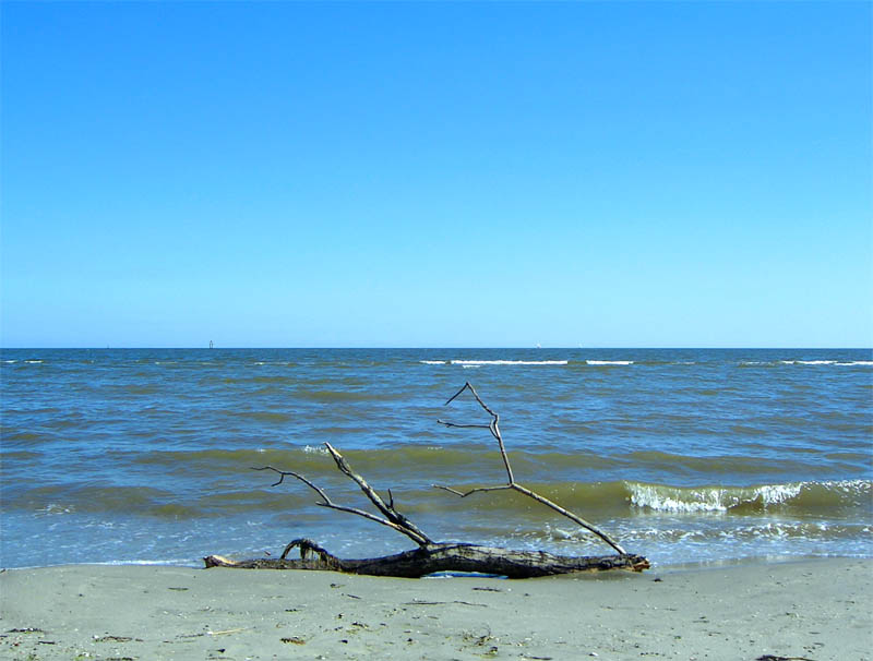 Lido di Volano, Comacchio, Emilia Romagna, Italia